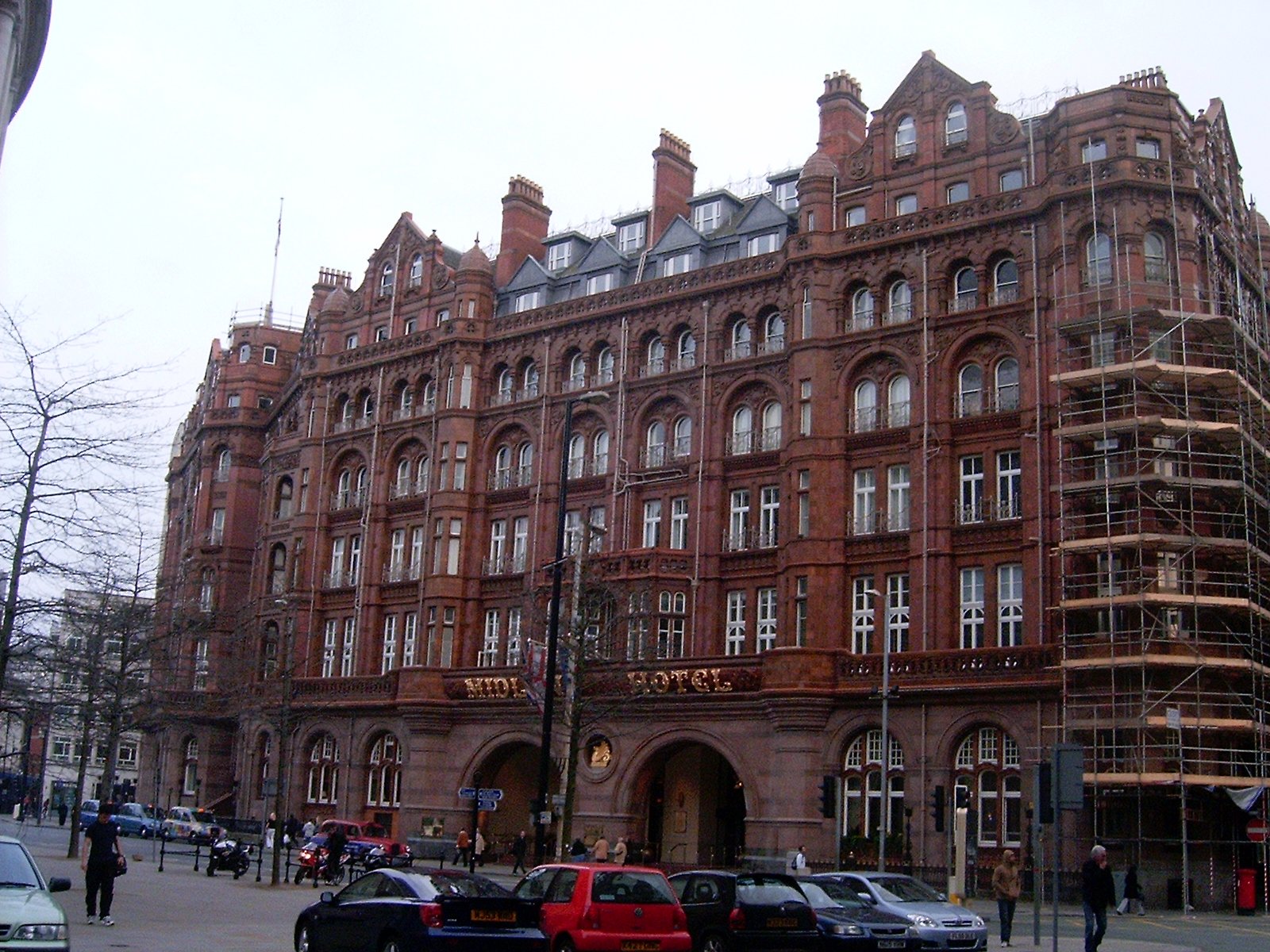 Midland Hotel (Manchester)